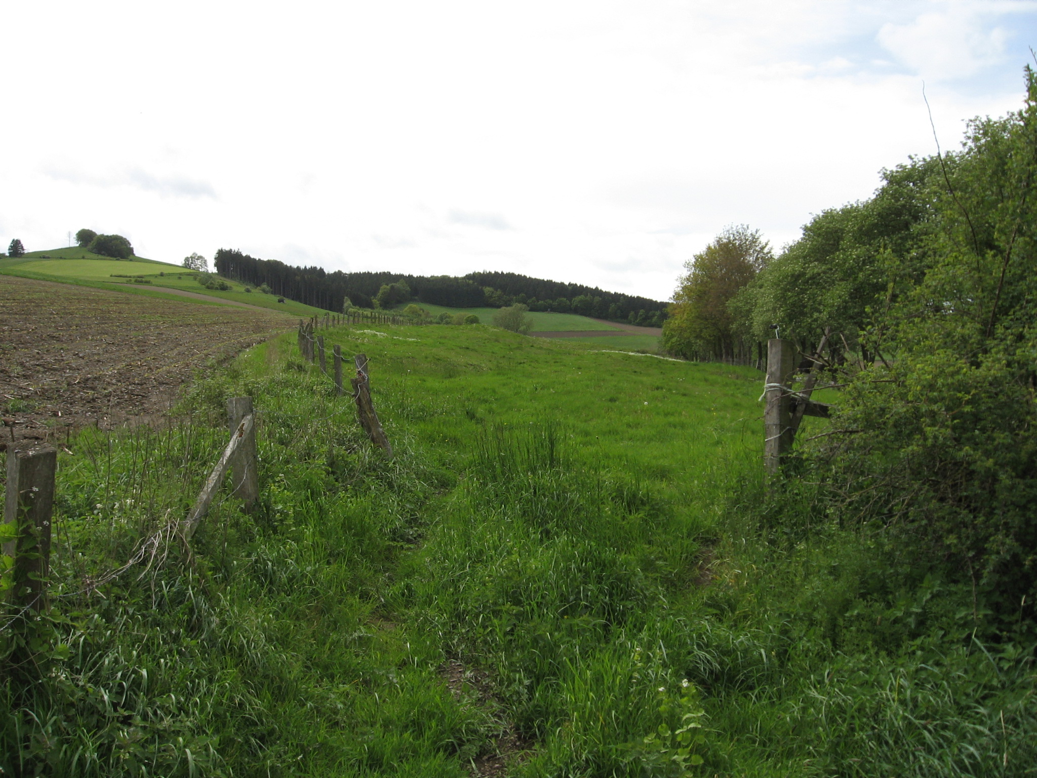 Das Naturschutzgebiet „Fettküche“ vom östlichen Rand aufgenommen. Rechts sind die Alleebäume der B 7 zu sehen.